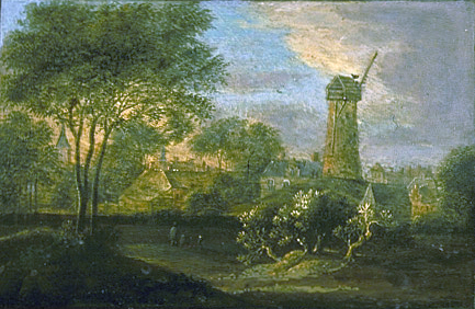 Onderdeel van Gezicht op Den Haag omgeven door twintig gezichten in de omgeving